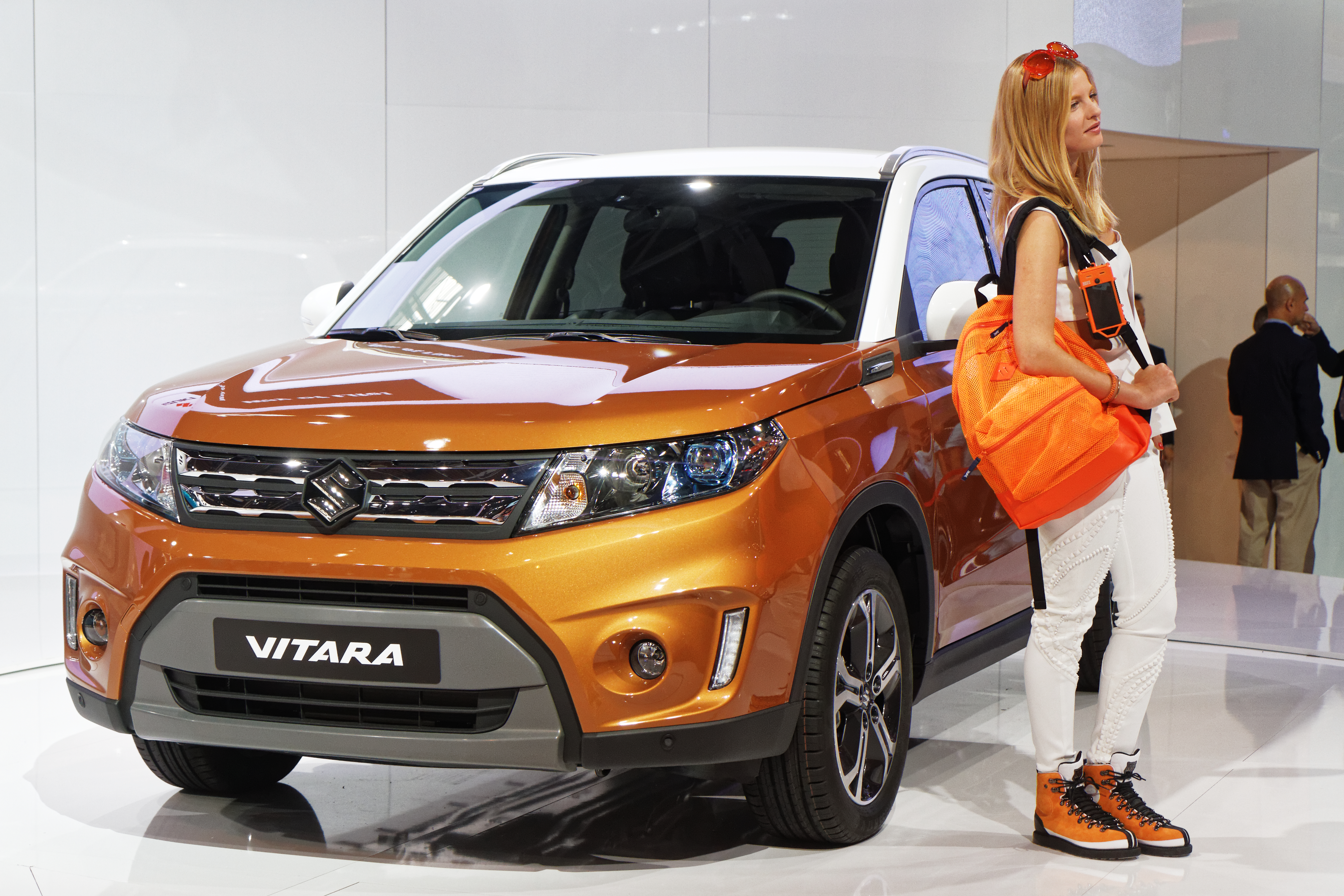 Une Suzuki Vitara présentée lors du mondial de l'automobile de Paris 2014.